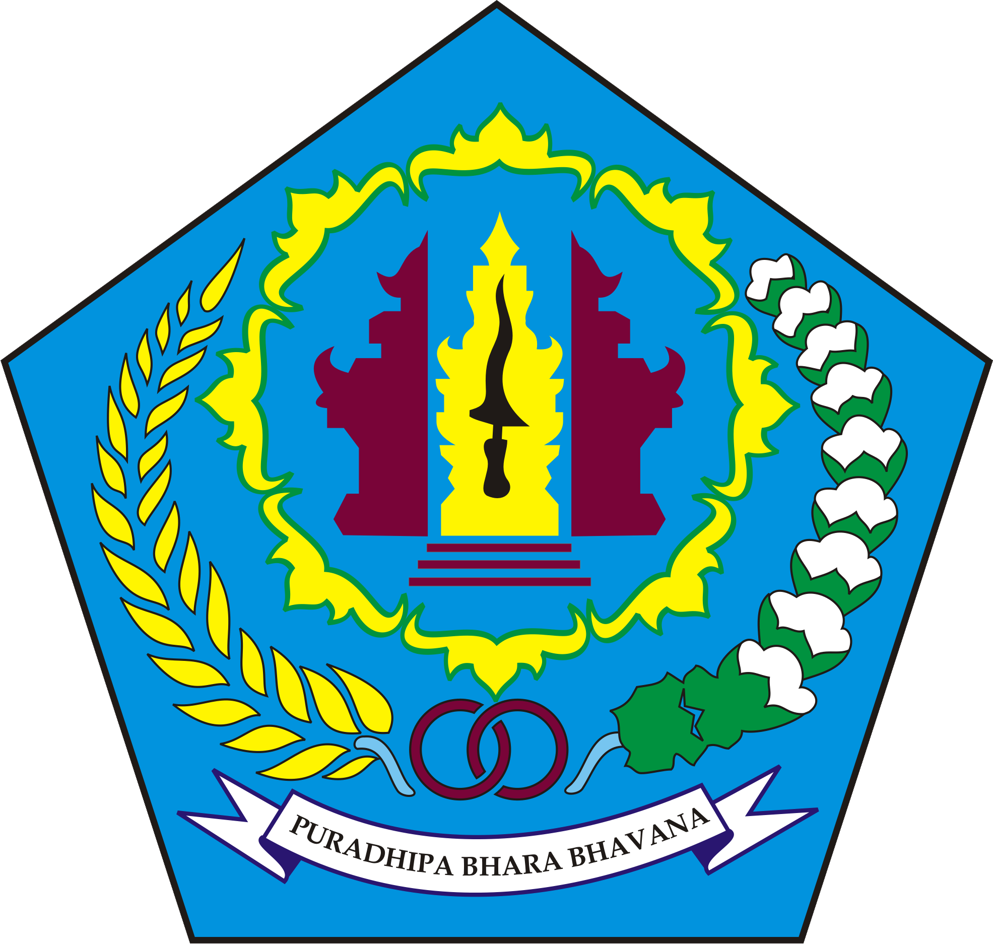 Diperoleh dari Situs Resmi Pemerintah Kota Denpasar denpasar.go.id